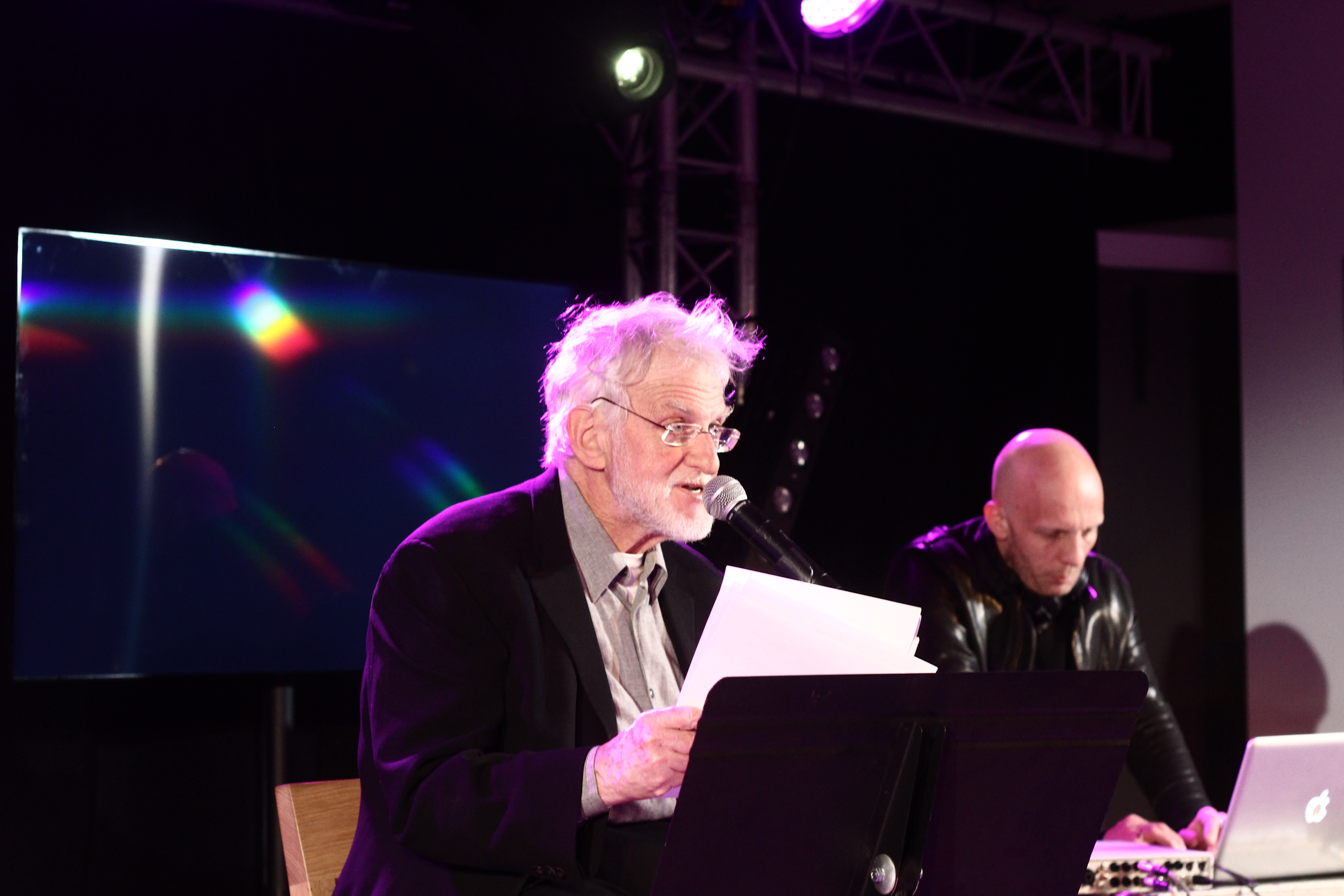 Nik Cohn, au Festival Livres et Musique 2014 de Deauville